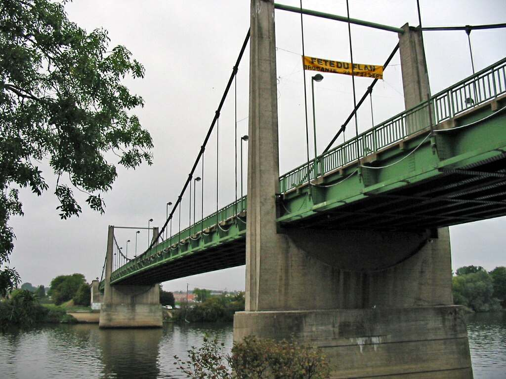 Pont de Triel (Yvelines) Photo JH Mora, septembre 2005